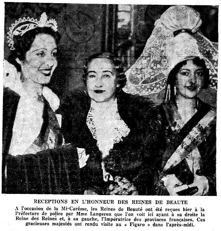 La réception de Fernande Botton Reine des Reines de Paris 1937 et Colette Richardy Impératrice des provinces françaises par Madame Langeron, épouse du Préfet de police de Paris, à la Préfecture de police de Paris le jeudi de la Mi-Carême 4 mars 1937.